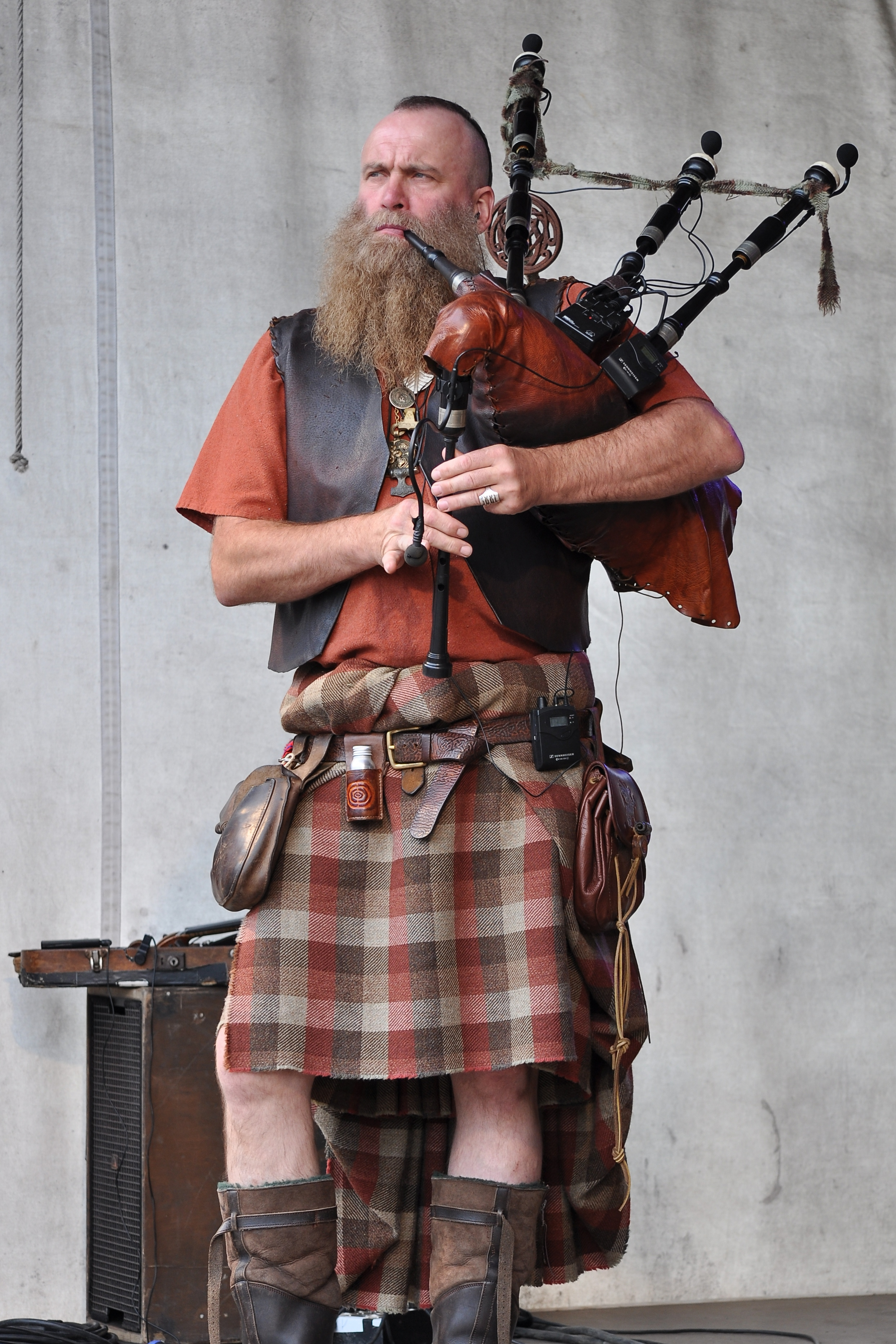 Saor Patrol beim MPS 2014 in Weeze